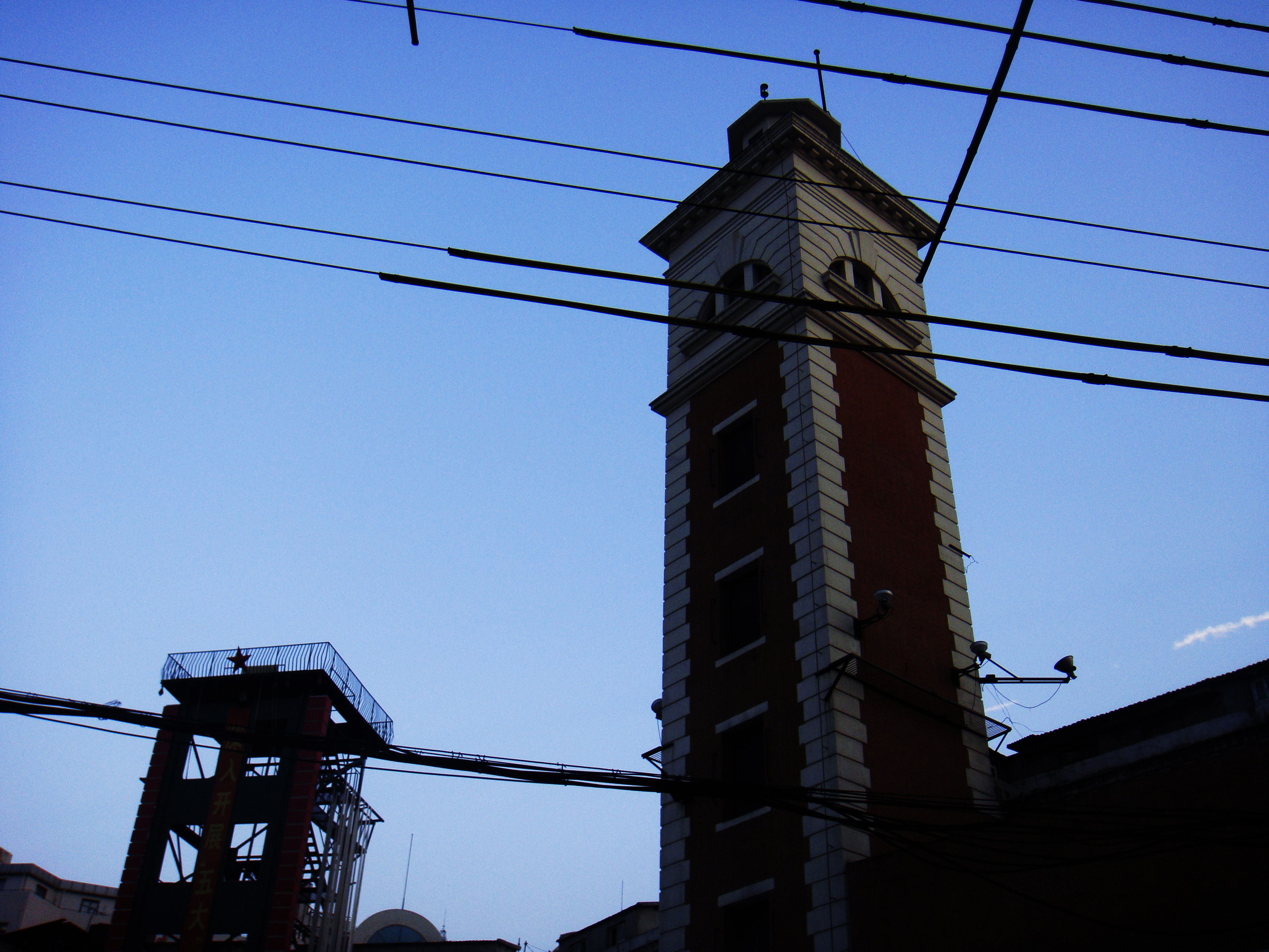 中文（中国大陆）: 虹口救火会的训练塔楼和瞭望塔楼